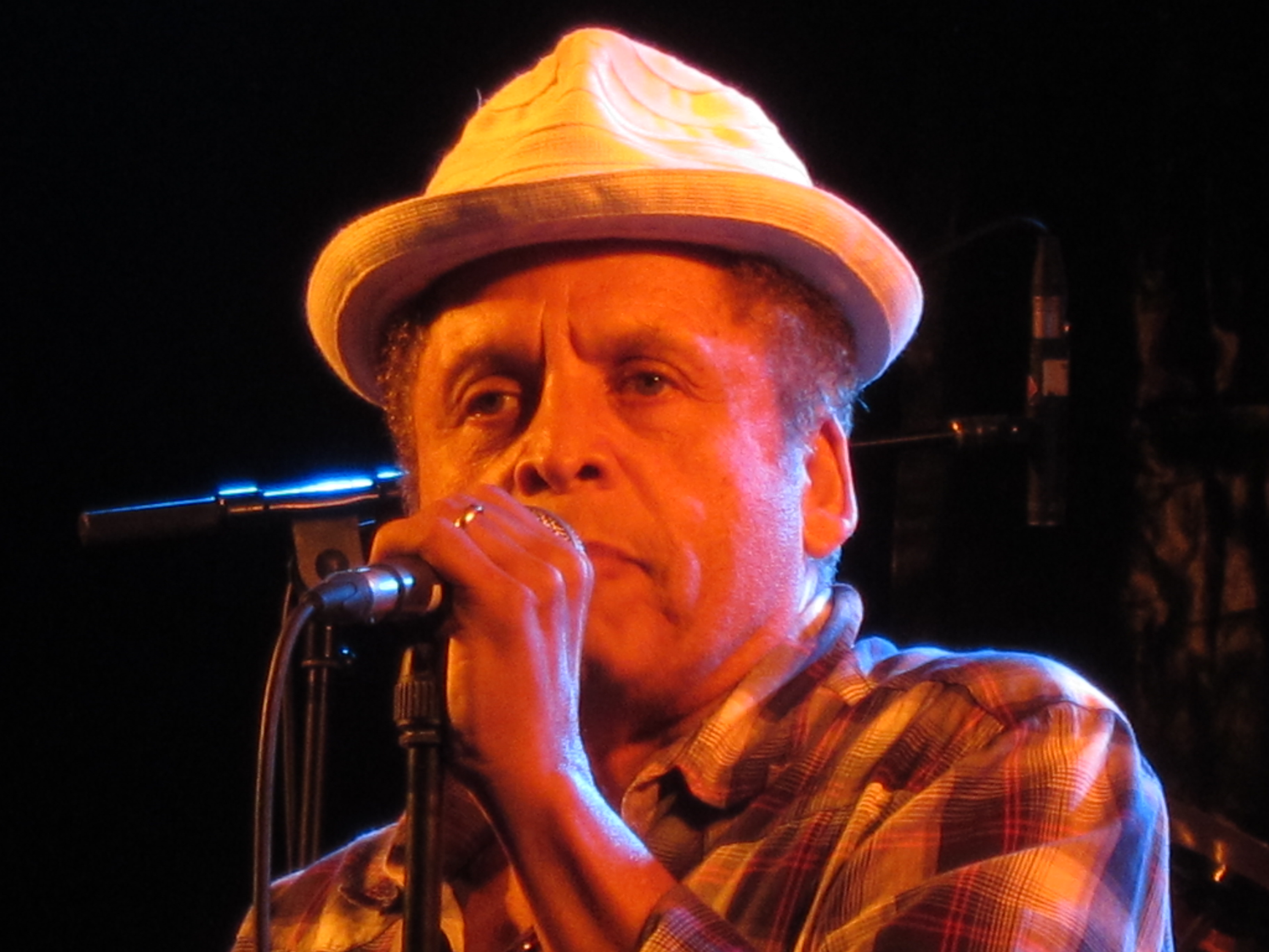 Amerikaans Singer/Songwriter